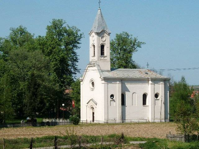 Crkva Barosevac